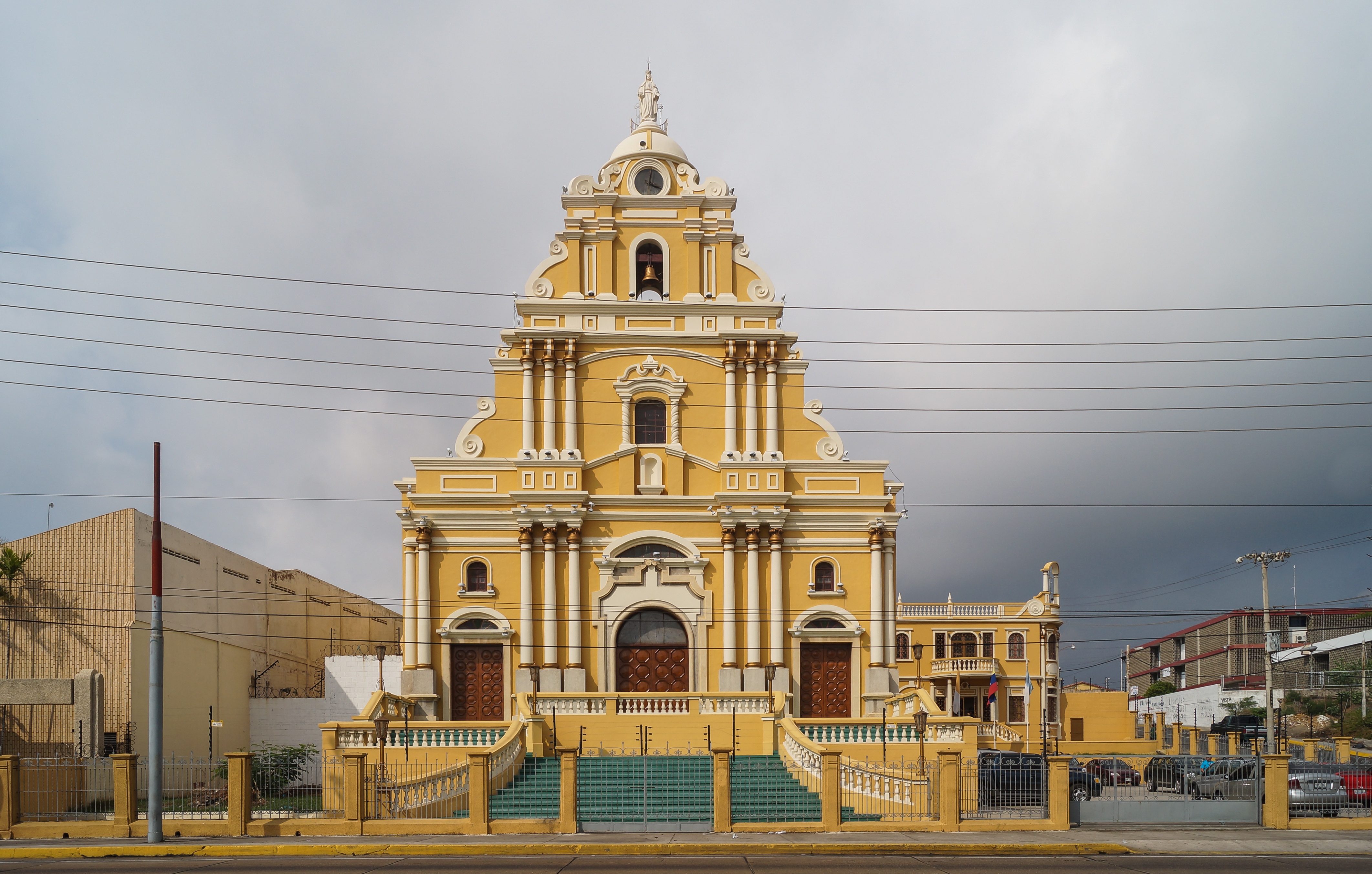 Iglesia de Nuestra Señora de la Medalla Milagrosa